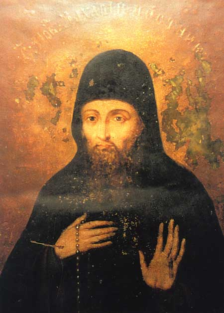 Захария Постник или Захария Печерский (XIII — XIV) — преподобный Русской православной церкви, постник Киево-печерский.